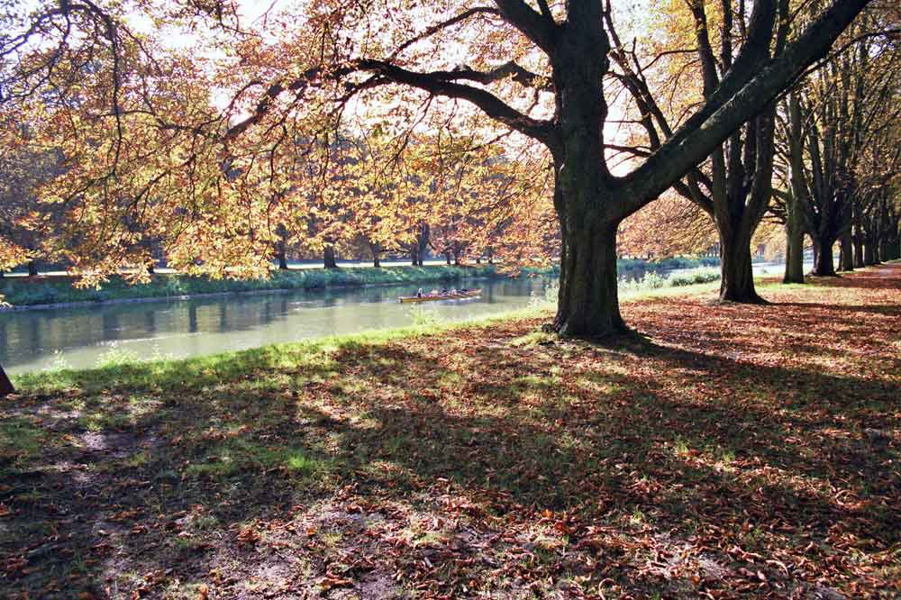 Decksteiner Weiher Köln-Sülz